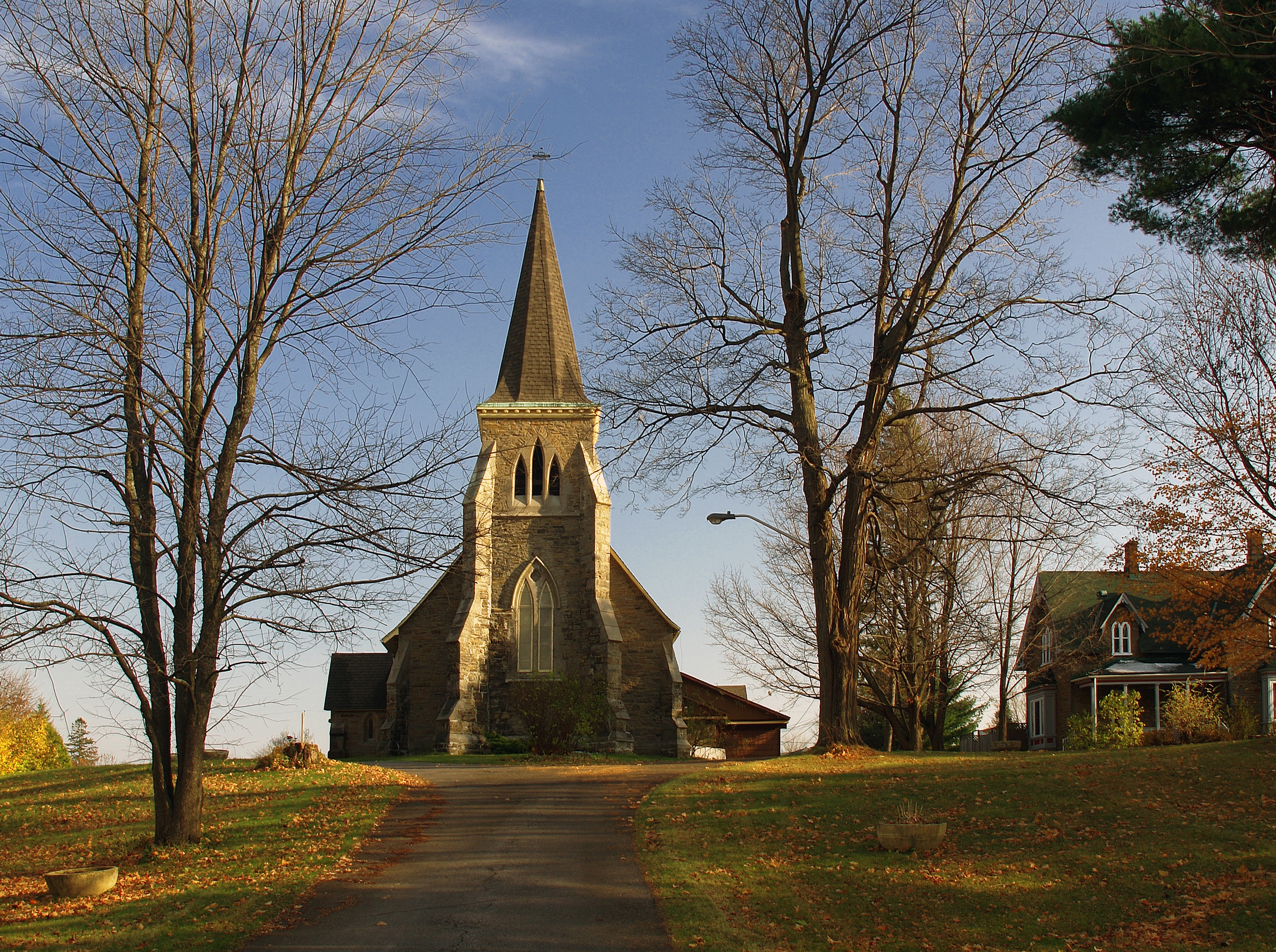 Anglican Church Hall-Holy Trinity - 440 Stanley Street , Hawkesbury , ONTARIO